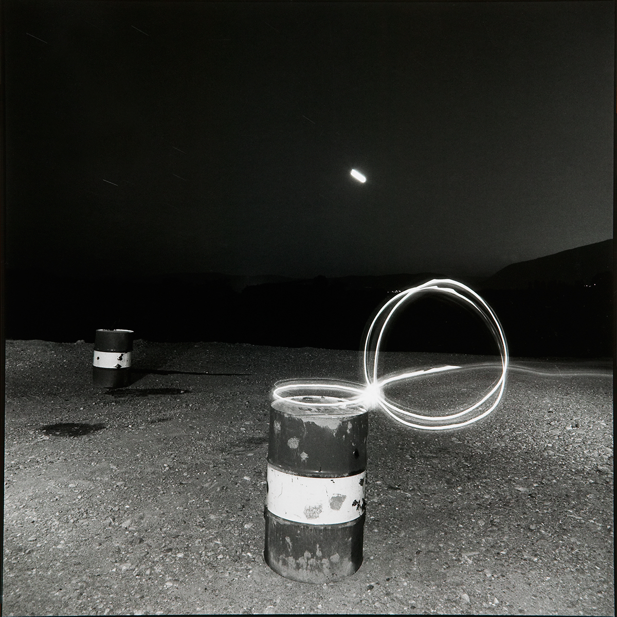 Graffiti greffées #19, 1979, tirage papier argentique vintage 40x 30 cm Grafted graffiti #19, 1979, gelatin silver print, 16 x 12’’, 40 x 30 cm, vintage print